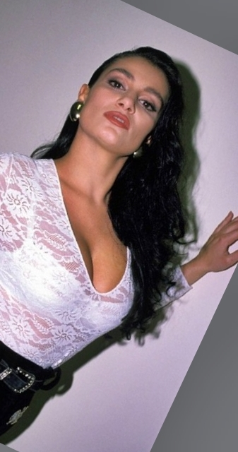 l'attrice italiana Angela Cavagna